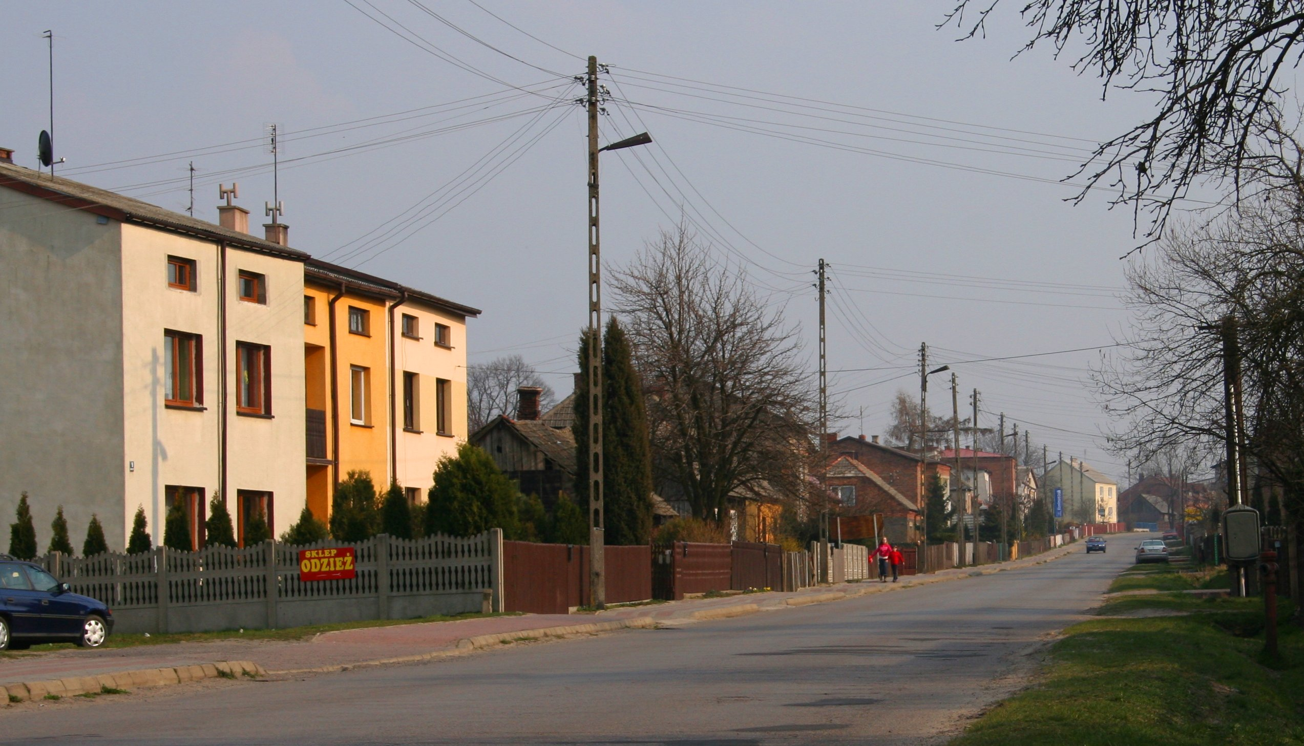 Fragment miejscowości Puszczew, gmina Wręczyca Wielka, powiat kłobucki, województwo śląskie